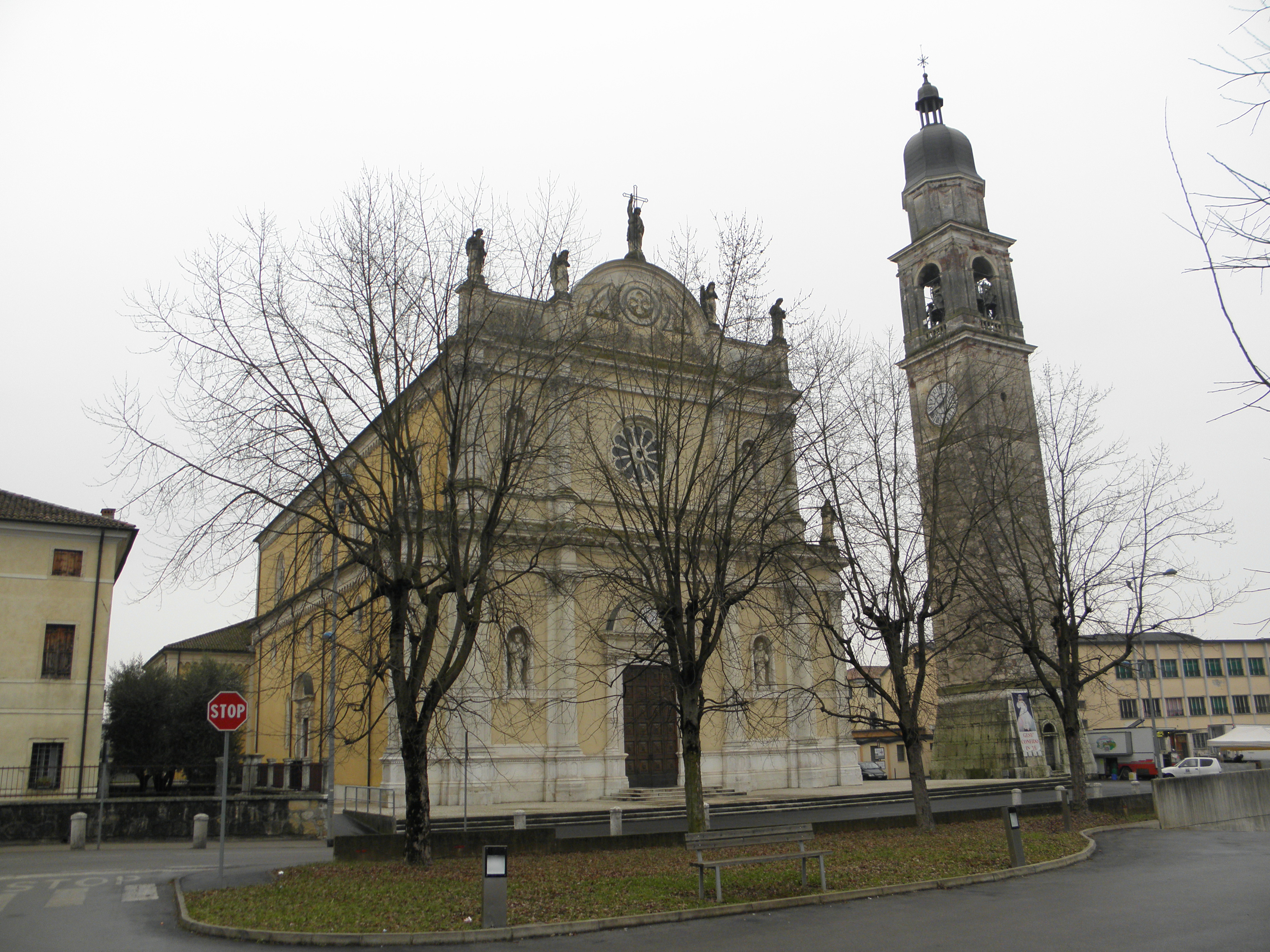 Isola Vicentina, la chiesa parrocchiale di San Pietro apostolo.